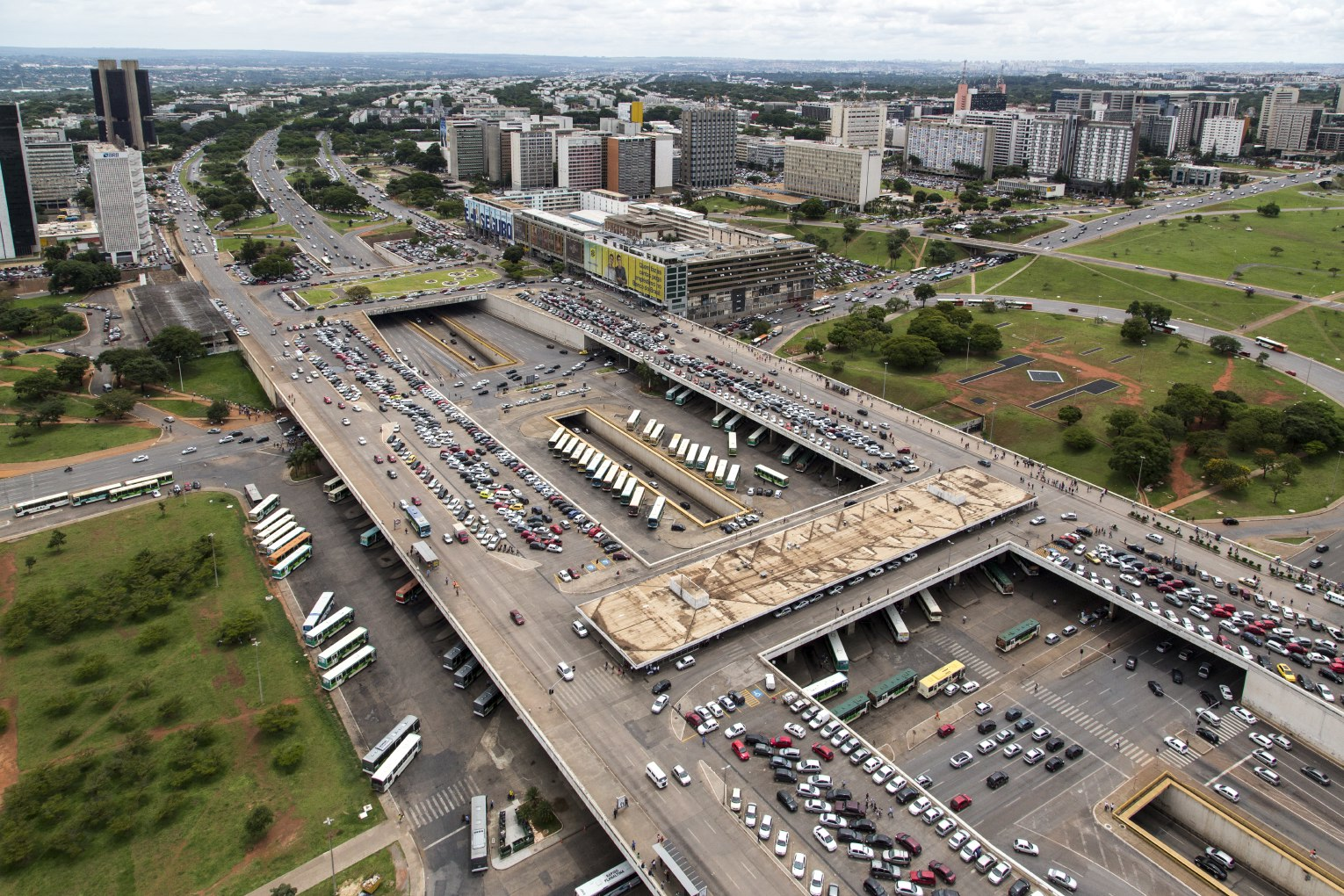 Vista aérea da região da Rodoviária do Plano Piloto, SHS, SBS e Asa Sul, em Brasília.